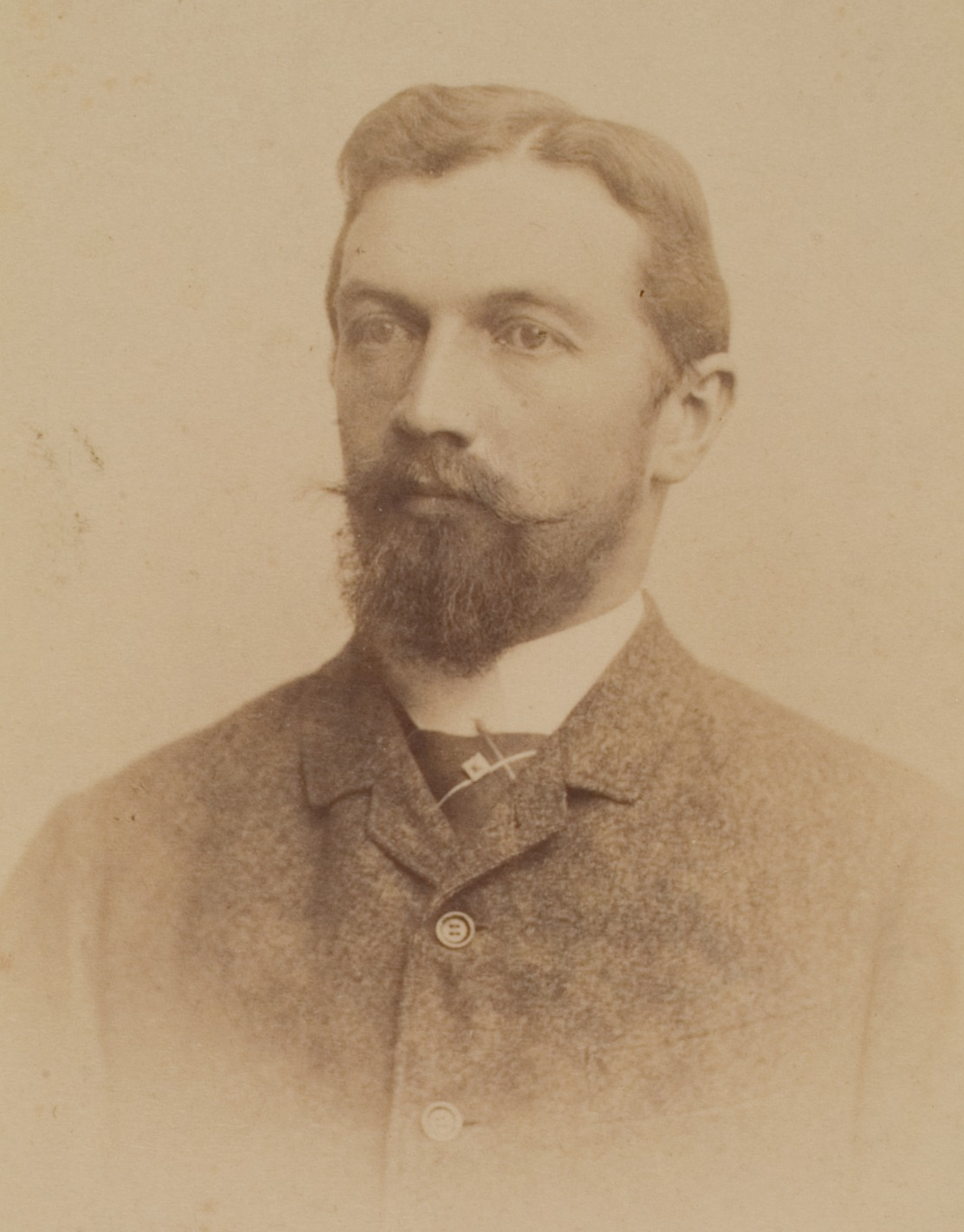 Martin Moebius, Botaniker, 1891–1893 Professor in Heidelberg